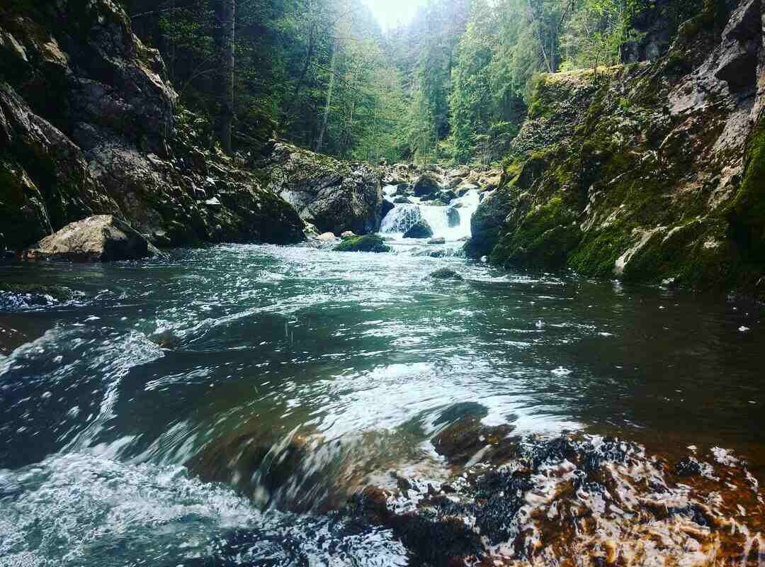 Ријека Ступчаница, Хан Пијесак, Република Српска.